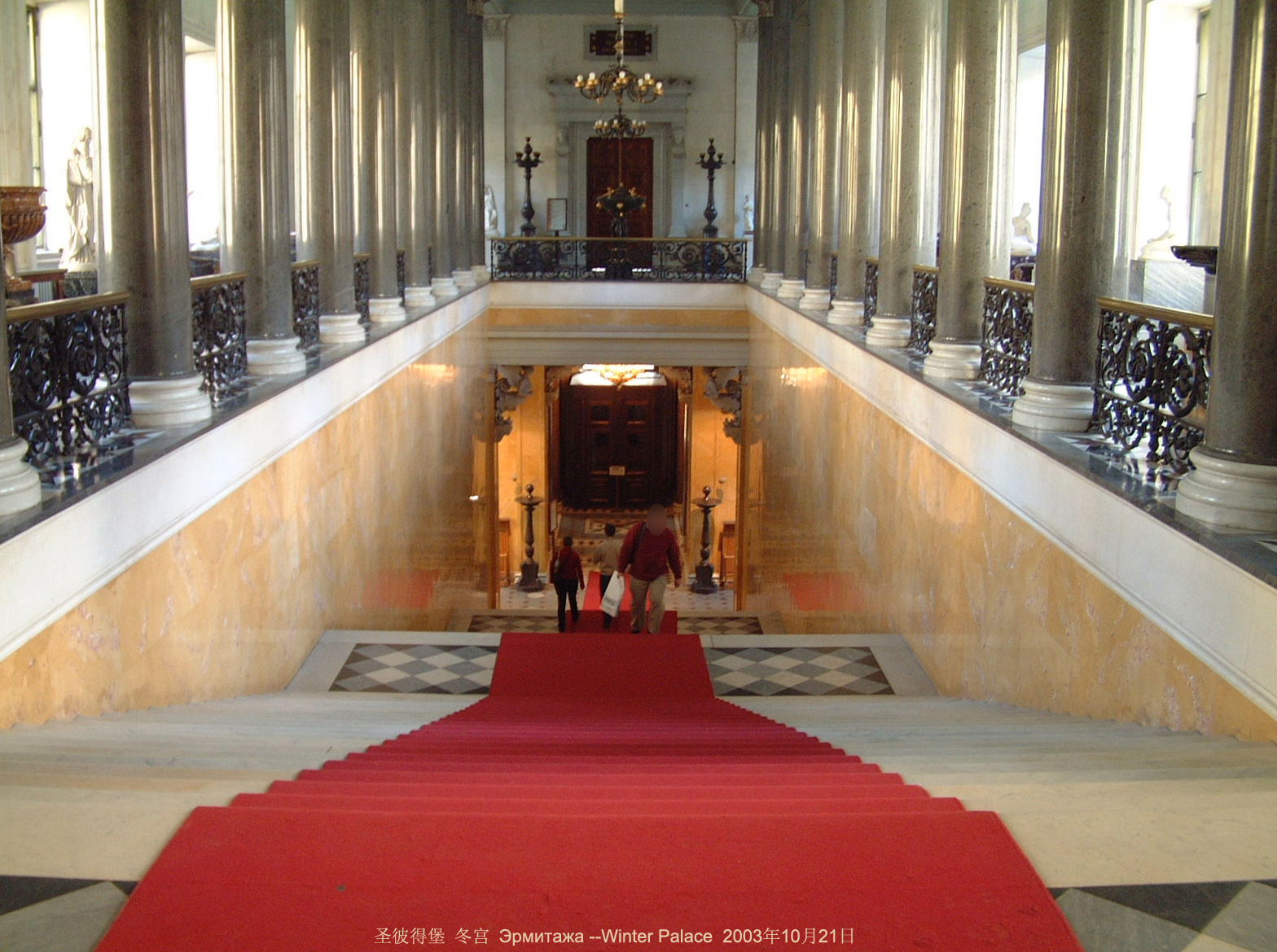 艾尔米塔什博物馆-----冬宫 Эрмитажа --Winter Palace